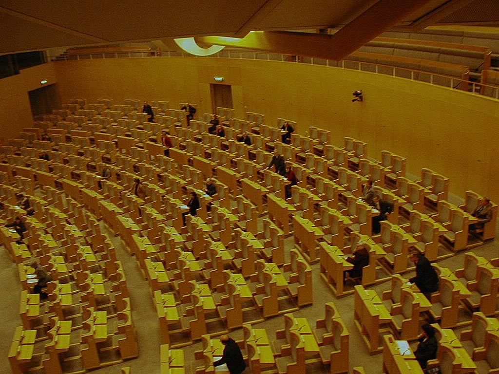 Fotograf: Petter Strandmark